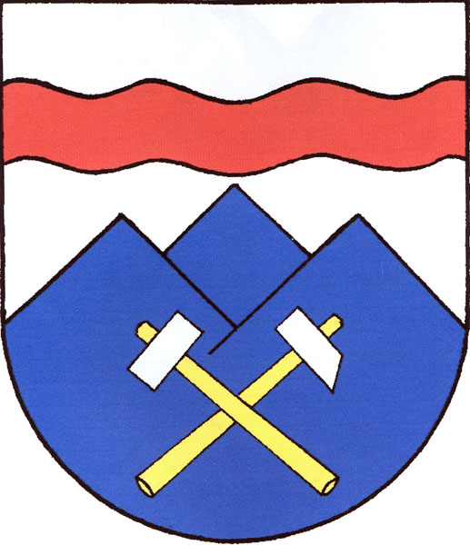 Česky: znak obce Horní Kalná